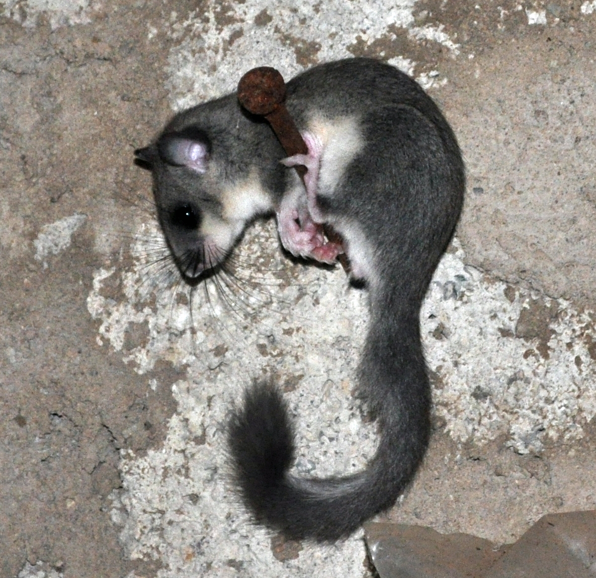 Siebenschläfer